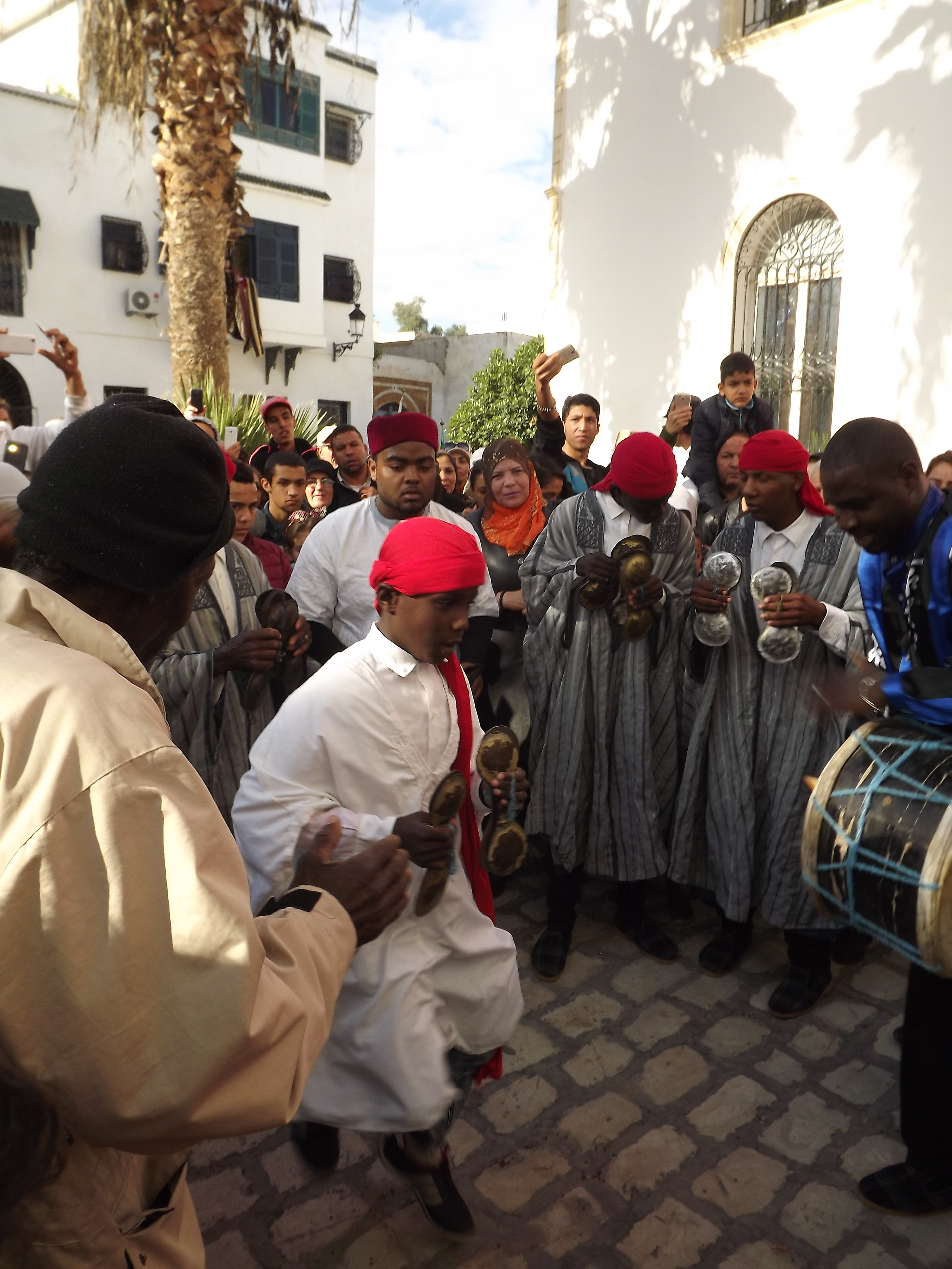 Stambeli de la confrérie de Sidi ali lasmer This is an image from Tunisia